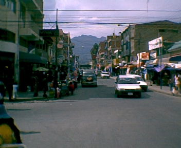 Vista de la calle heroes del Chaco en la ciudad de Quillacollo - Cochabamba, es la calle mas transitada de la ciudad ademas de ser el ingreso principal hacia el centro de la ciudad.